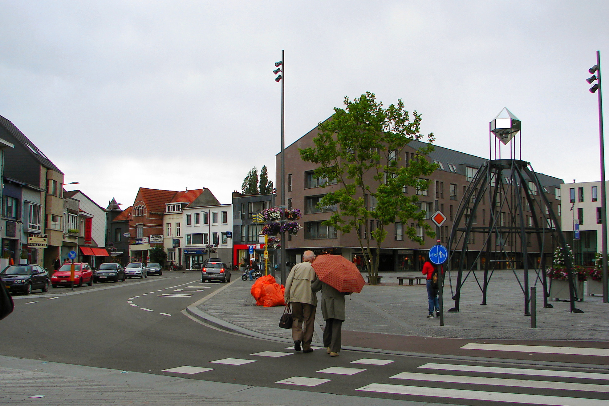 Centre of Kapellen, Belgium